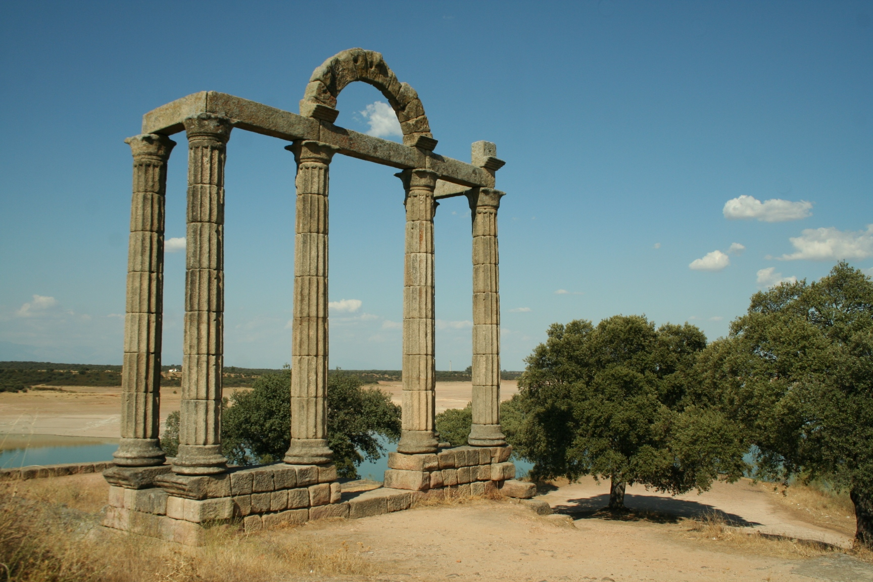 Columnata de «los Mármoles» (s. II d.C.): pórtico de un edificio considerado Curia (20,43 x 11,55 m) construido en granito. Fue trasladado piedra a piedra en 1963 desde Talavera la Vieja, de donde procede, hasta su emplazamiento actual junto a la carretera de Navalmoral de la Mata a Guadalupe.